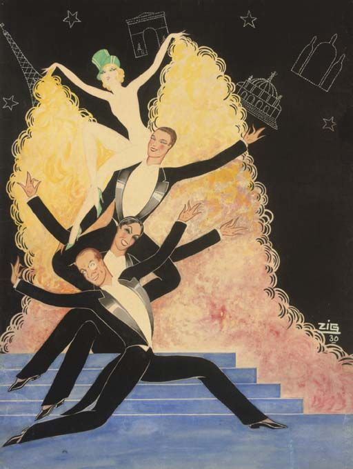 Mistinguett